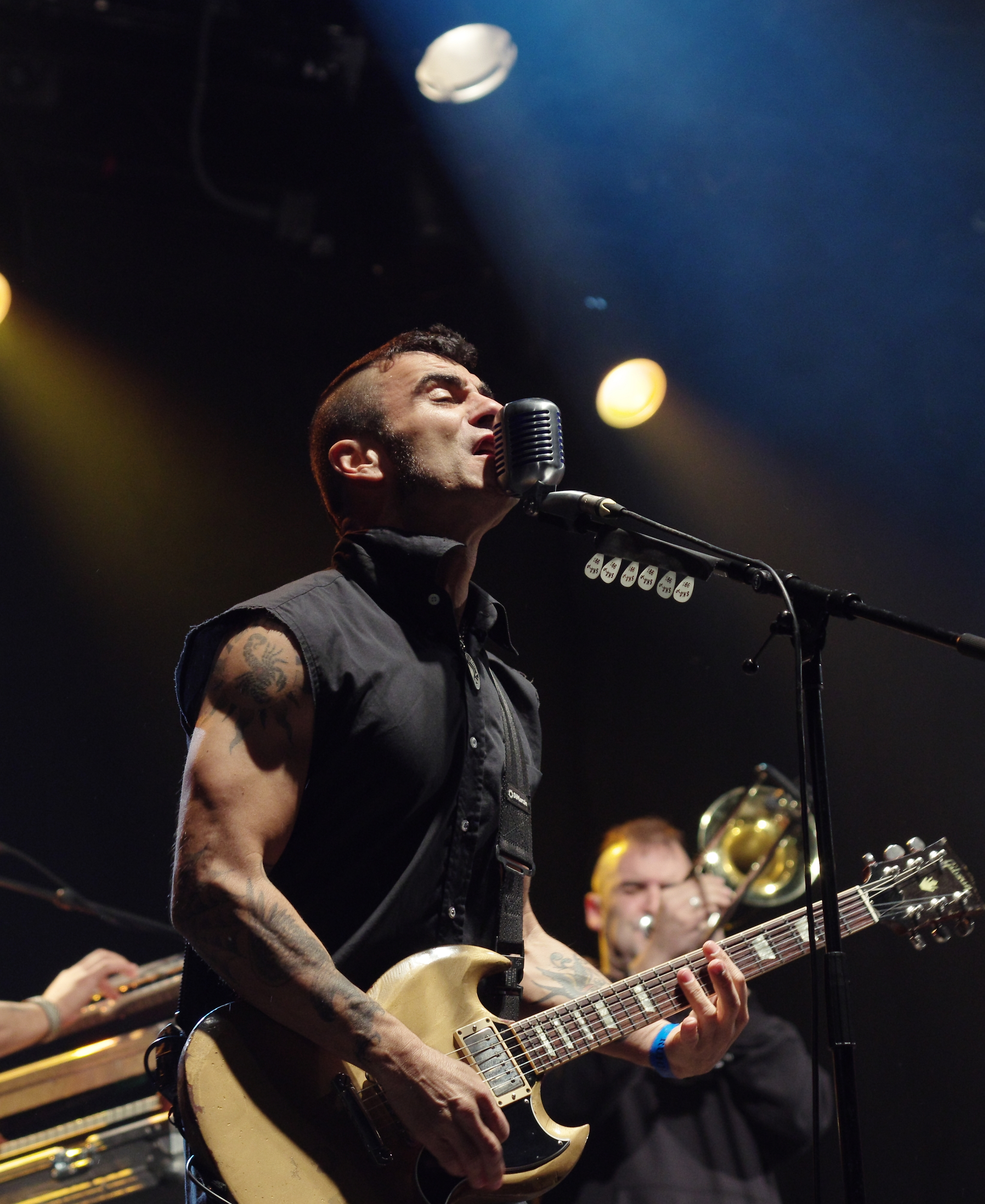 Ska-P beim Ruhrpott Rodeo 2013. Besetzung: Roberto Gañán Ojea (Pulpul) (Gesang, Rhythmus-Gitarre); Ricardo Degaldo de la Obra (Pipi) (Showmaster, Zweitstimme); José Miguel Redín Redín (Joxemi) (Lead-Gitarre); Julio César Sánchez (E-Bass); Alberto Javier Amado (Kogote) (Keyboard); Luis Miguel García (Luismi ) (Schlagzeug, Perkussion); Garikoitz Badiola (Gari) (Posaune); Alberto Iriondo (Txikitin) (Trompete)